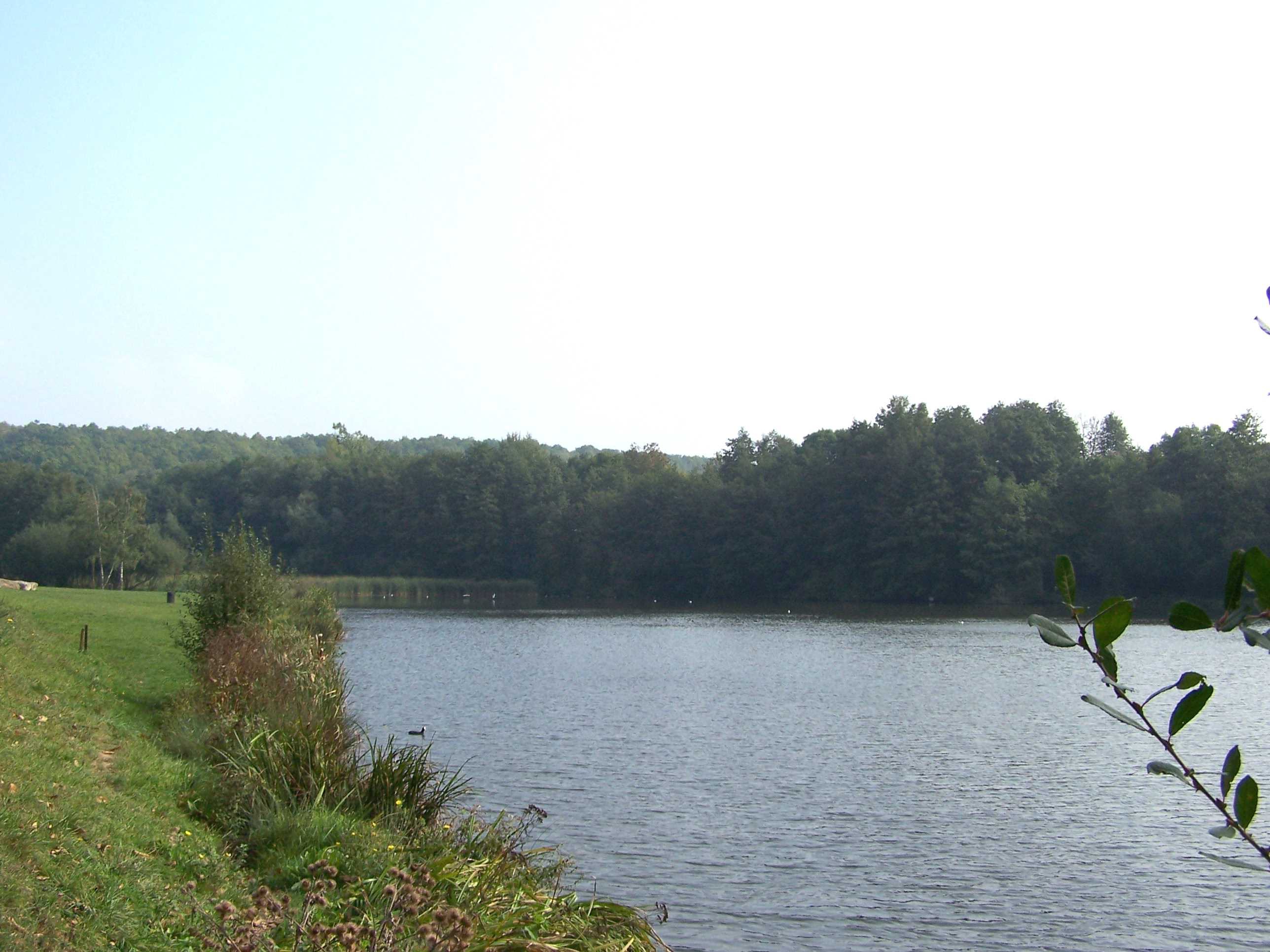 Bassin de la Cranne à Plaisir (Yvelines, France)